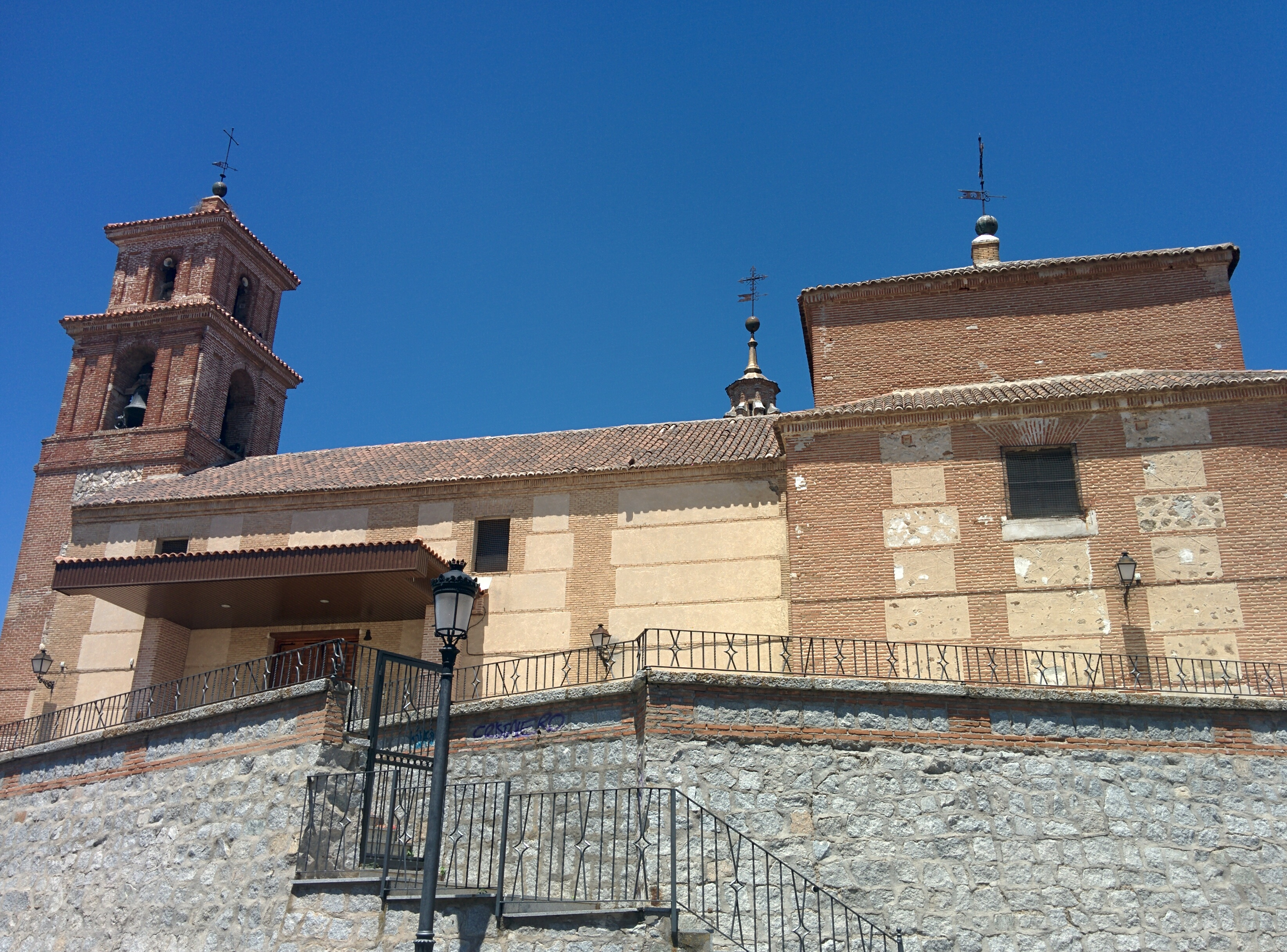 Iglesia de San Juan Bautista, en Yuncos (Toledo, España).